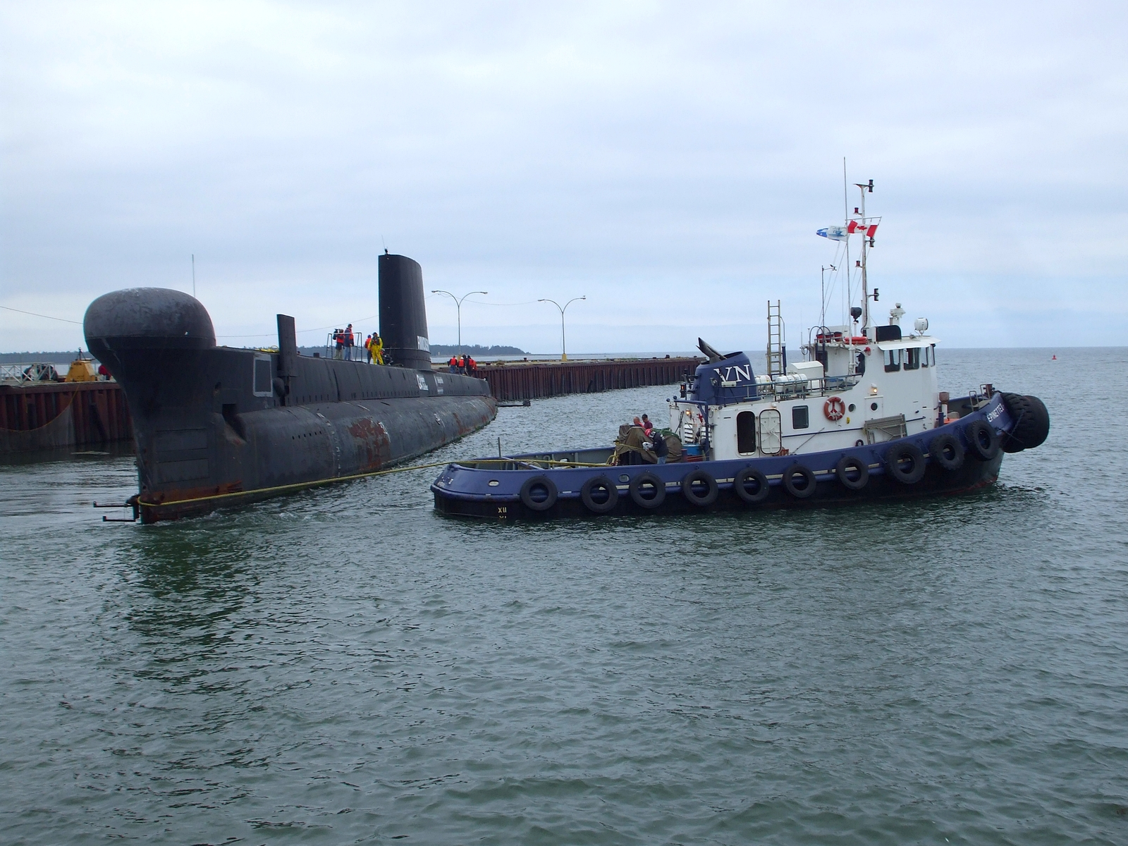 Français cadien: Le sous-marin NCSM Onondaga à son départ de Rimouski, vers Pointe au Père, Qc, Canada. Ou il sera exposé et visiter : Projet de musée.